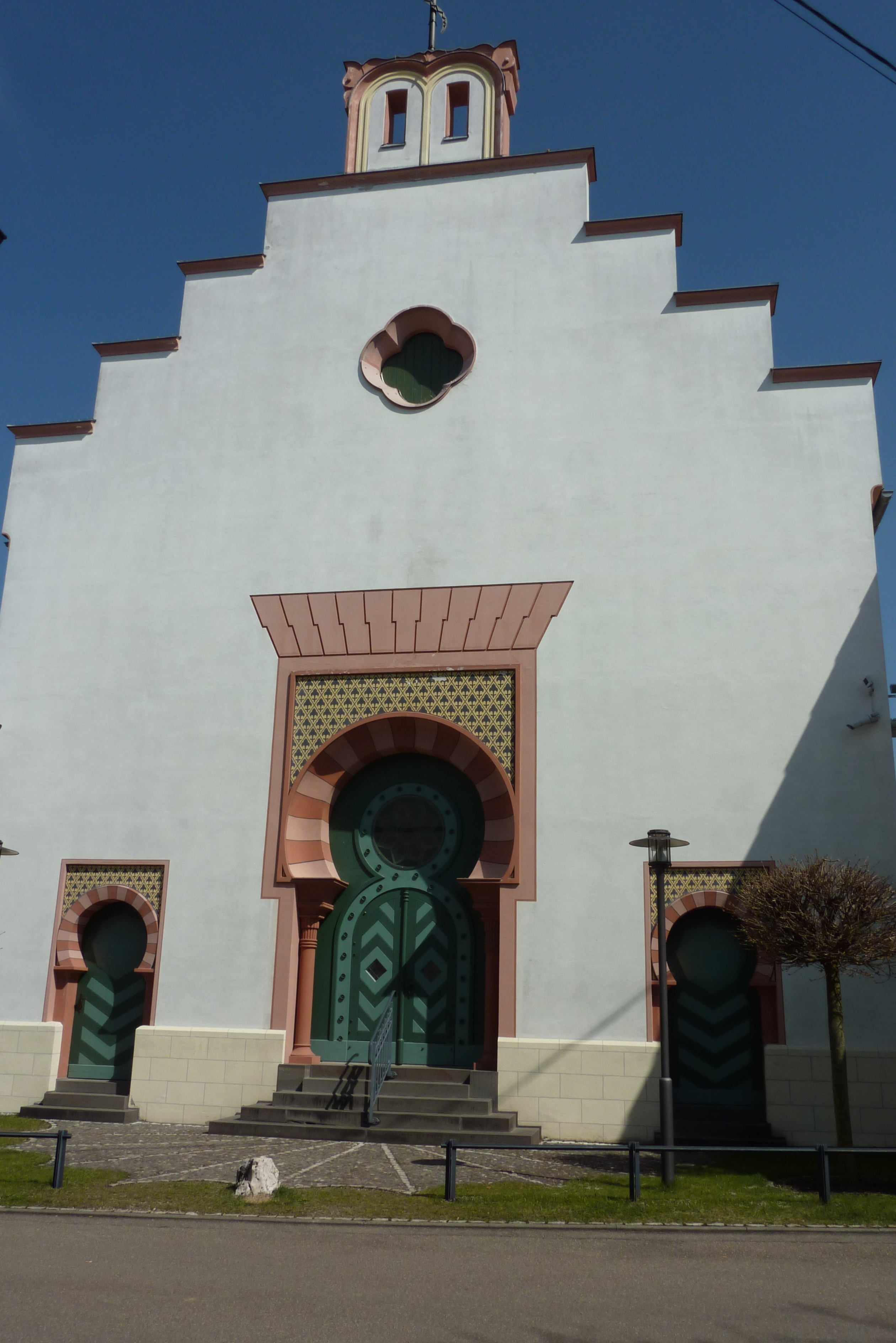 Synagoge in Binswangen, erbaut 1836/37, Portalfassade bzw. Westfassade